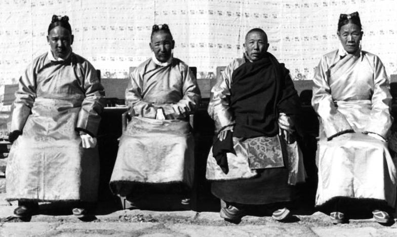 Lhasa, tibetische Minister